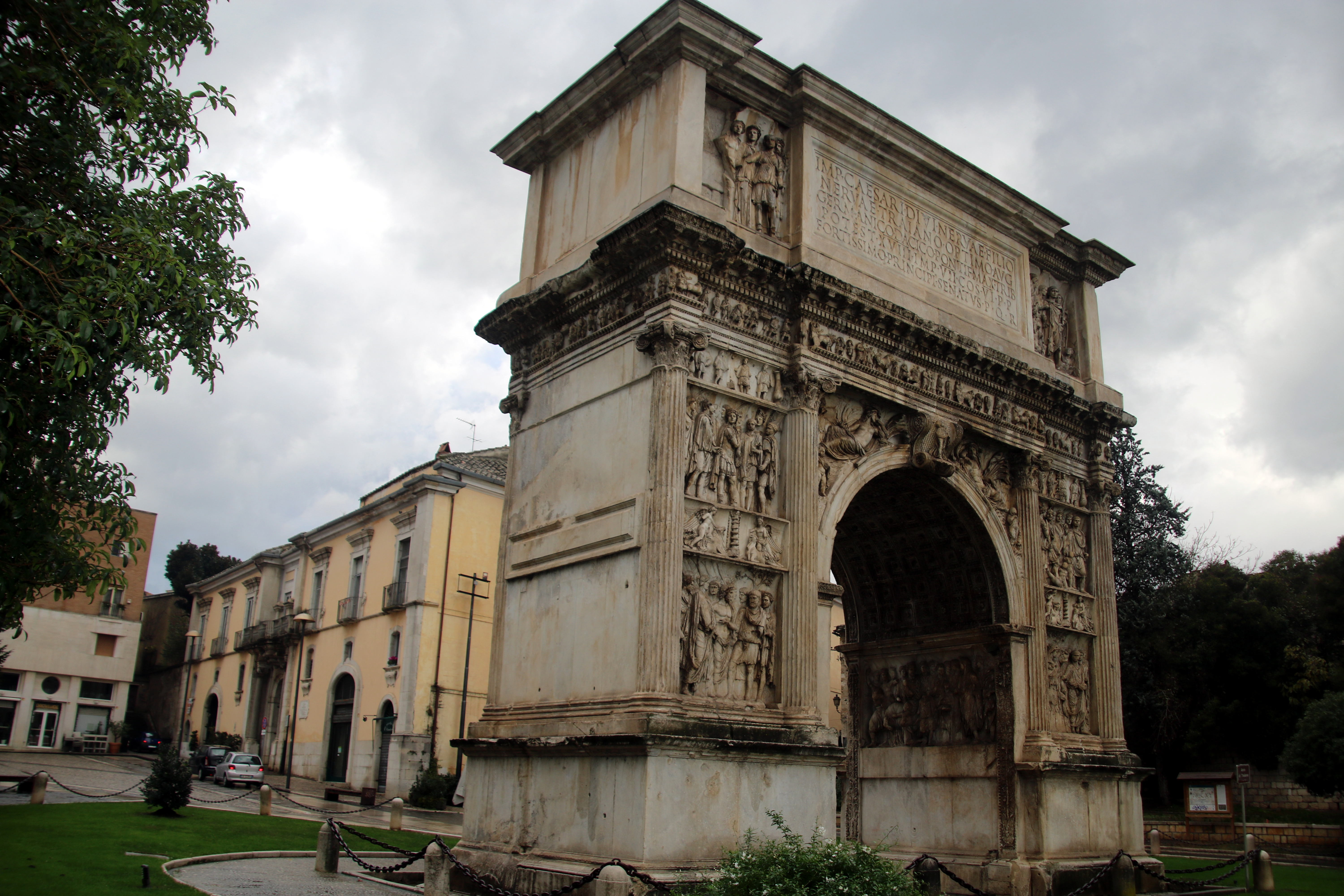 Arco di Traiano (Benevento)